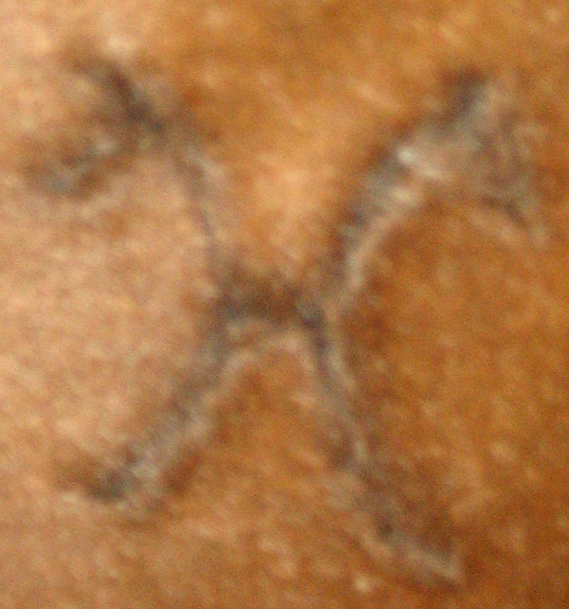 Hannoveraner Zuchtbrand